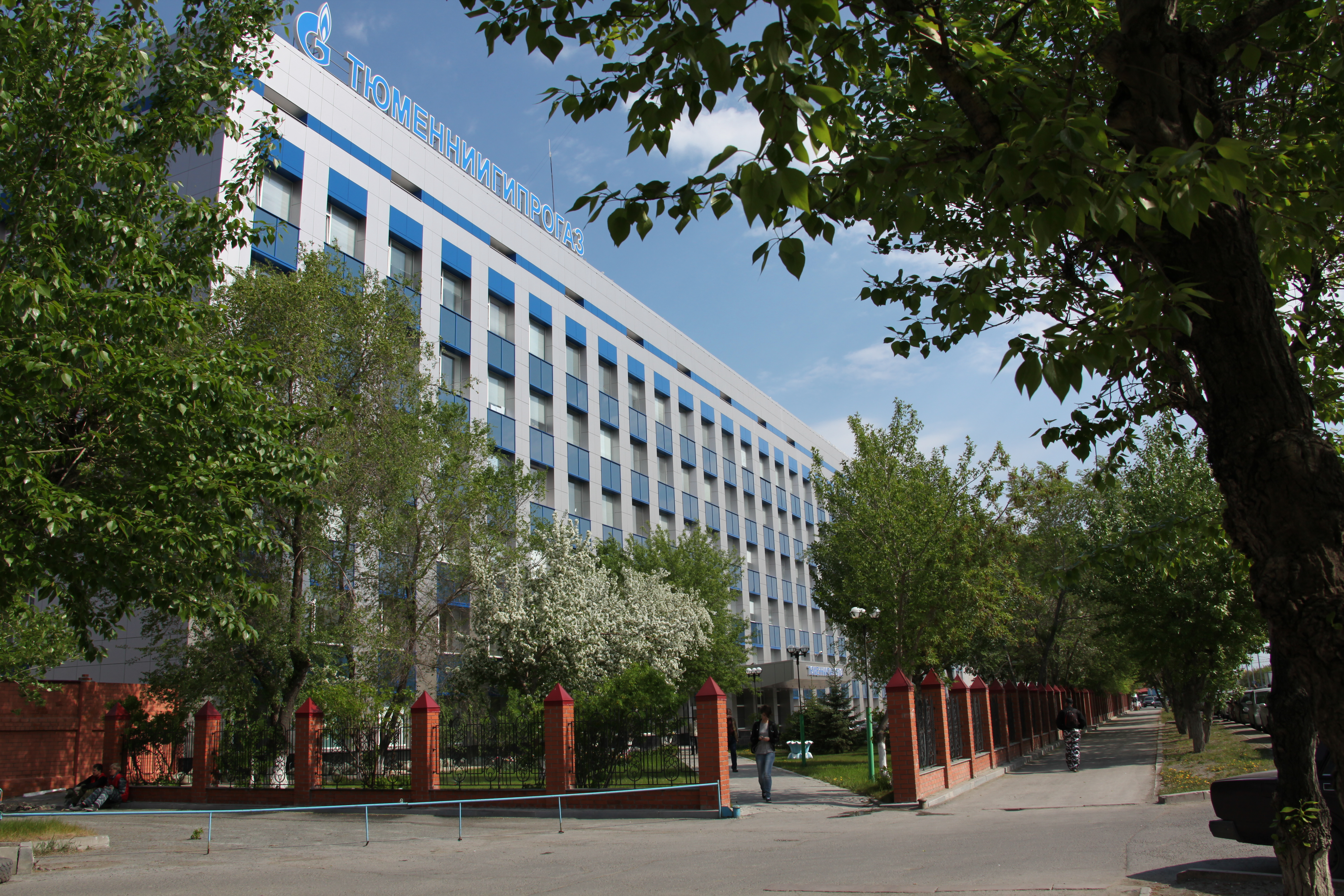 Главный корпус ООО "ТюменНИИгипрогаз". г. Тюмень, Россия.